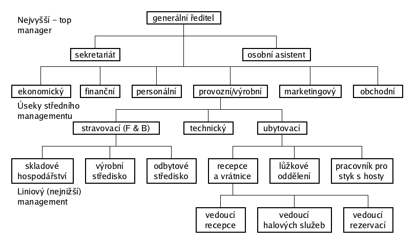 Příklad funkcionální struktury aplikované v hotelovém provozu. Autor: Petr K.